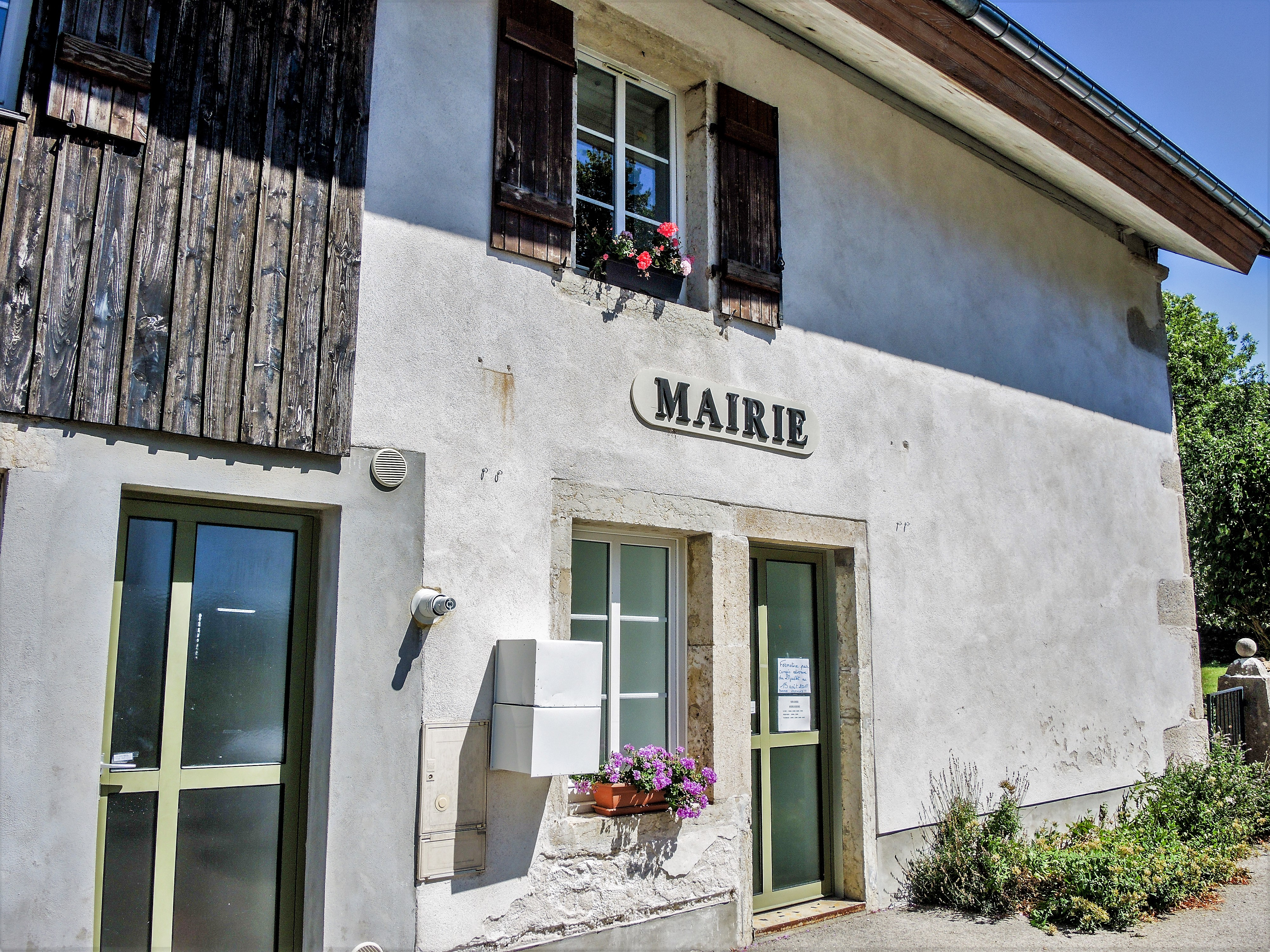 Façade de la mairie des Bréseux. Doubs